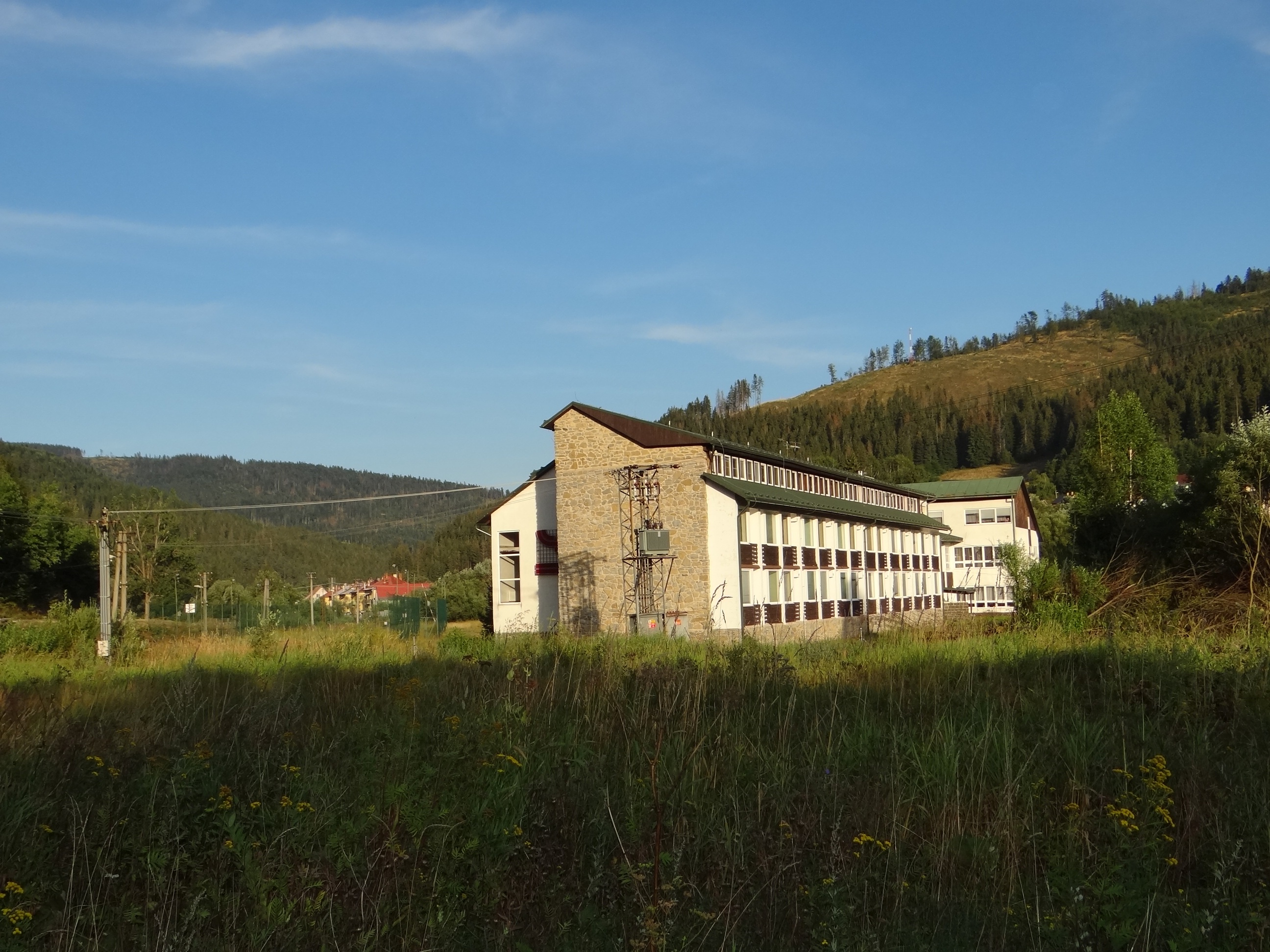 Mlynky